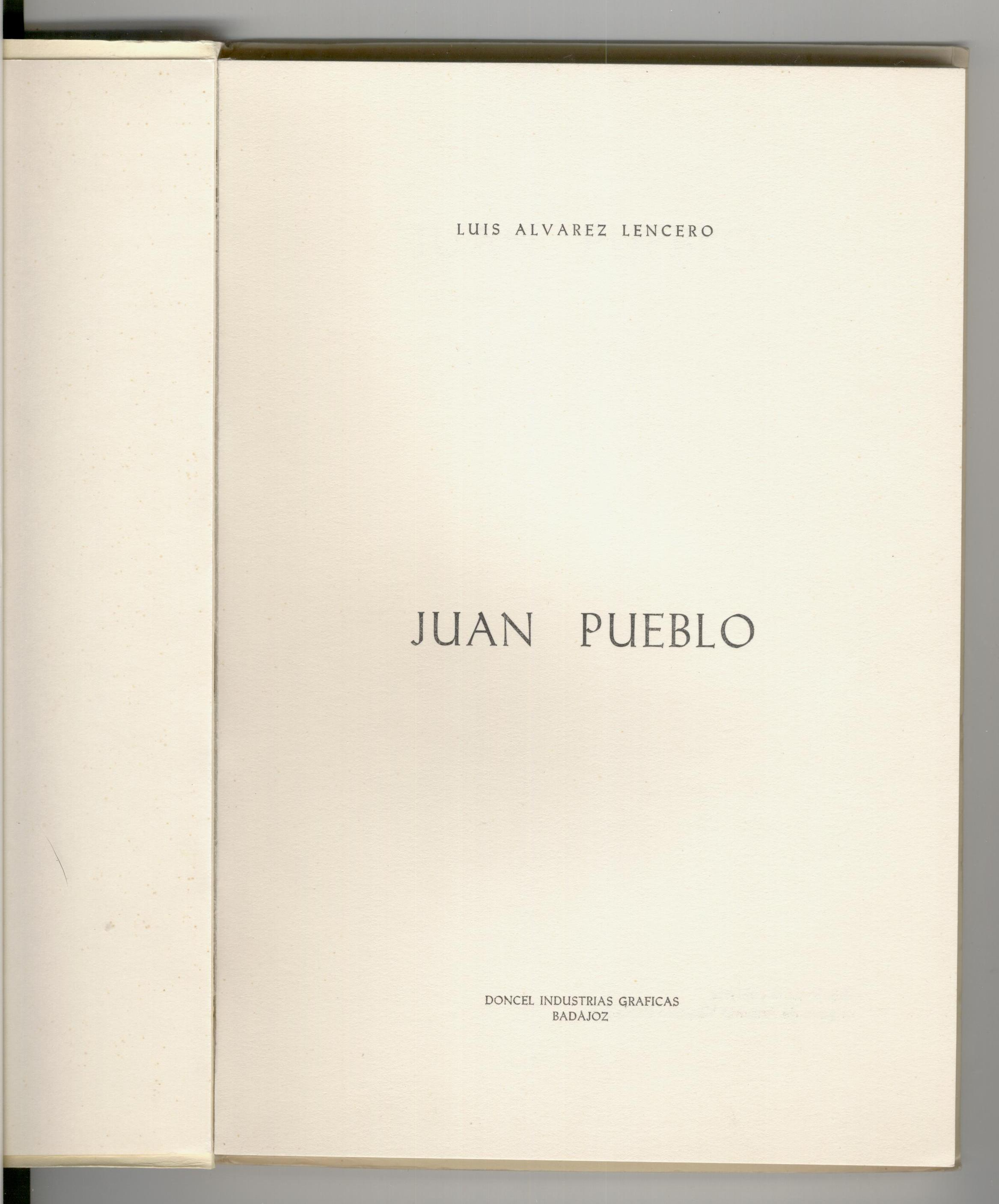 Luis Álvarez Lencero. Juan Pueblo. Badajoz: Imp. Doncel Industrias Gráficas. 1971. Imagen de portada. Q55435314 (1923–1983) DescriptionSpanish poet, sculptor and painterDate of birth/death 9 August 1923 10 June 1983Location of birth/death Badajoz MéridaAuthority control : Q55435314